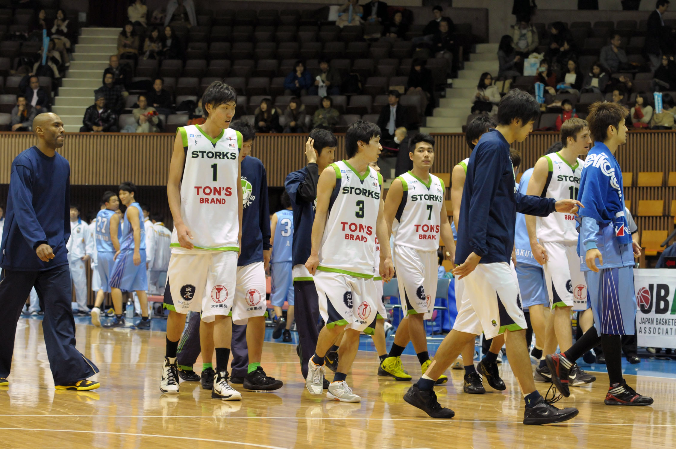 兵庫ストークス、代々木第二体育館で。